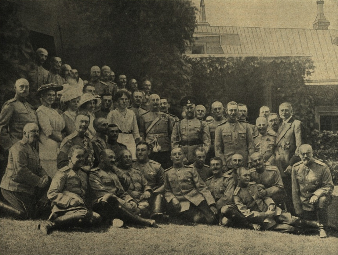 Ахтырский полк в гостях у своего шефа Ольги Александровны в Петергофе.